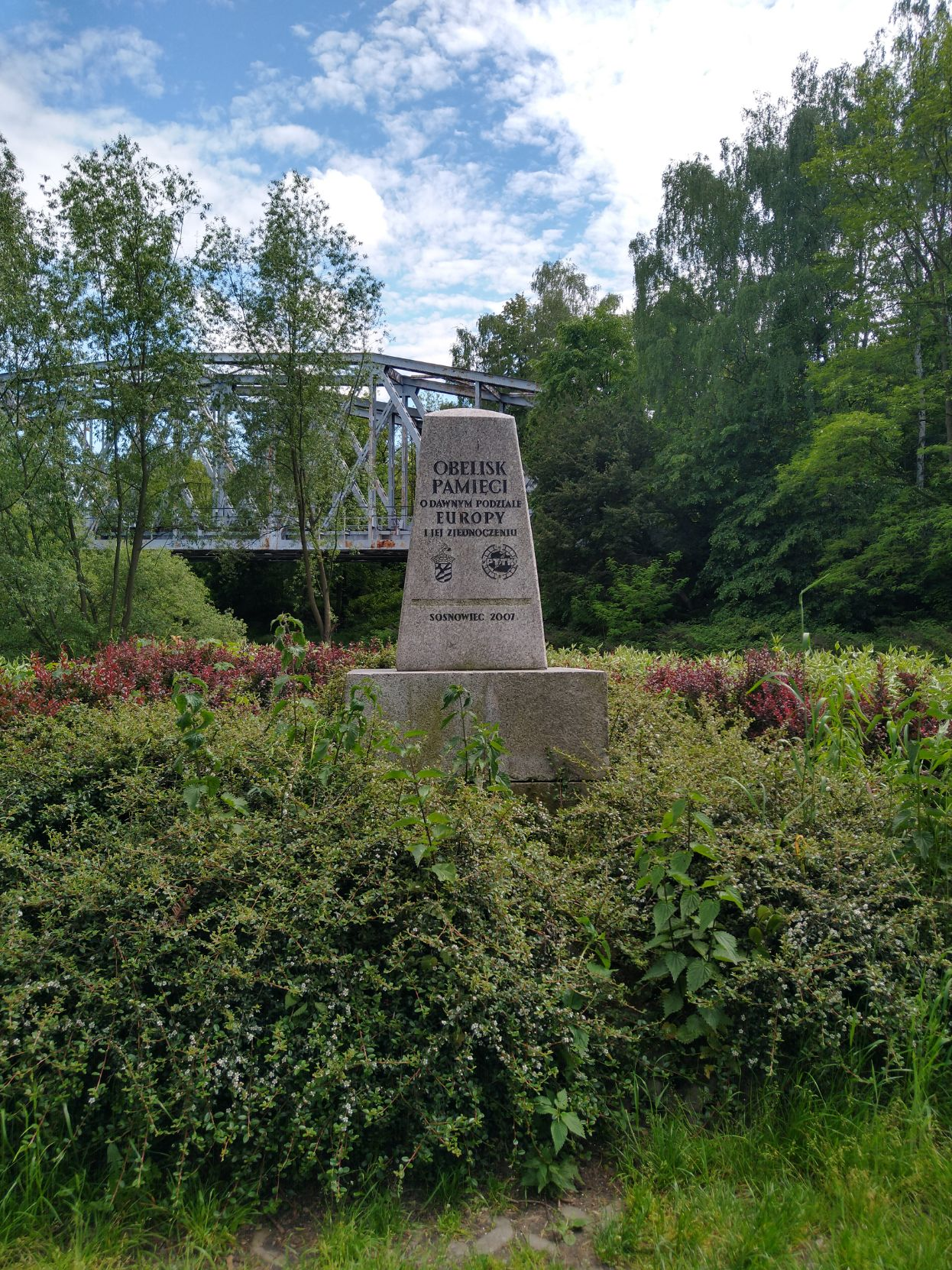 Obelisk znajdujący się w miejscu Trójkąta Trzech Cesarzy na granicy Sosnowca i Mysłowic